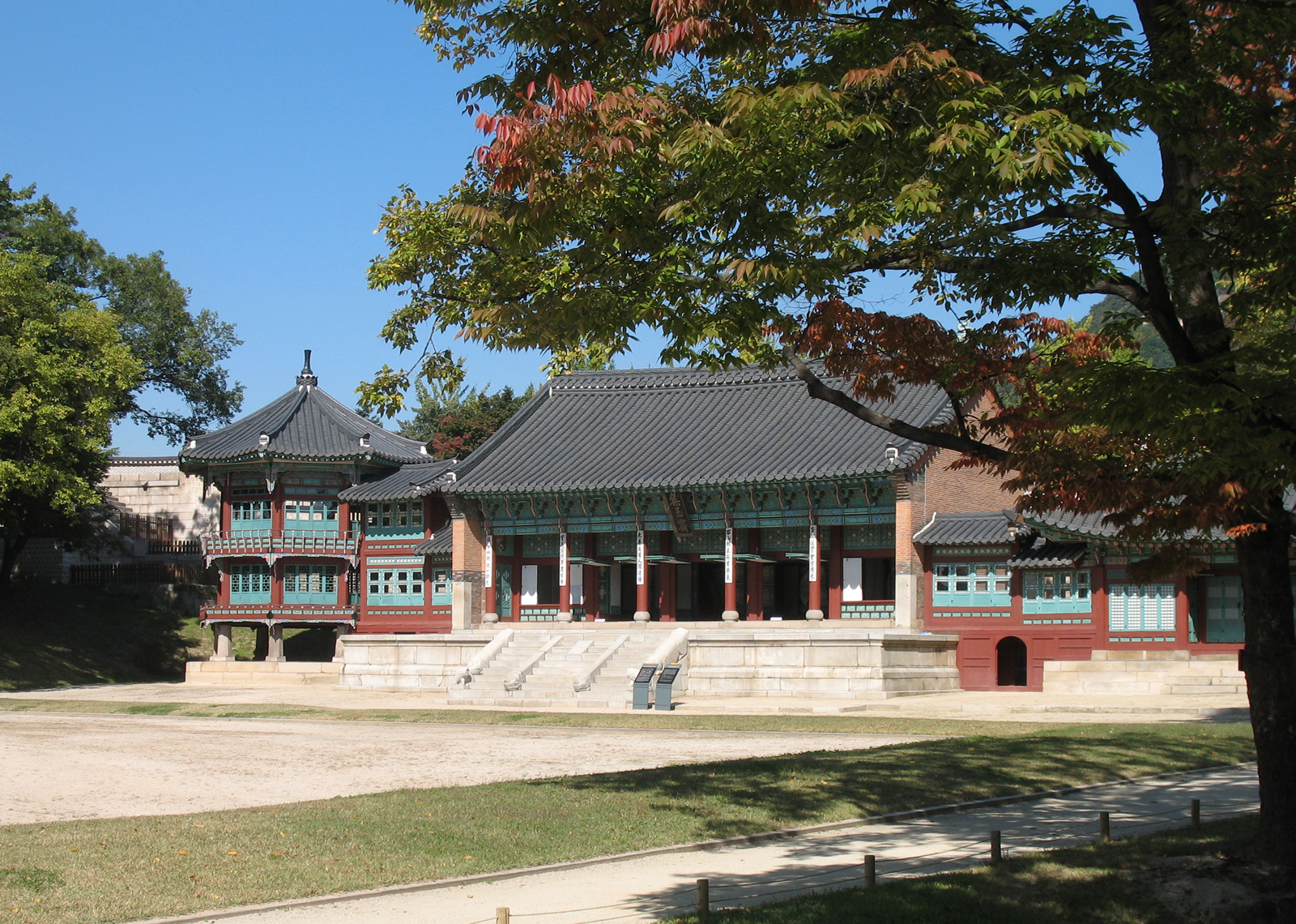 Jibokjae Hall in Gyeongbokgung